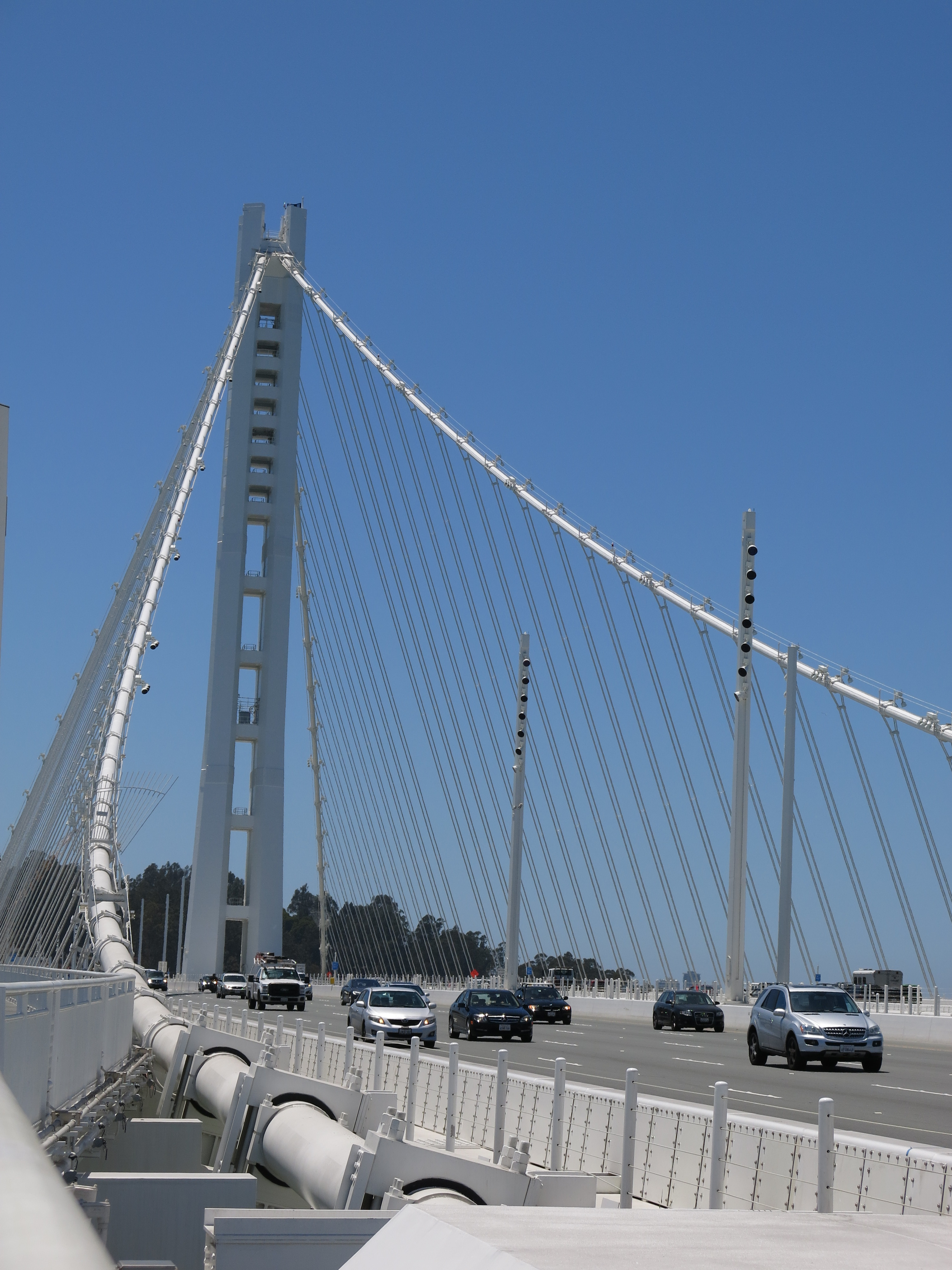 Bay Bridge vom Rad- und Fußgängerweg aus fotografiert